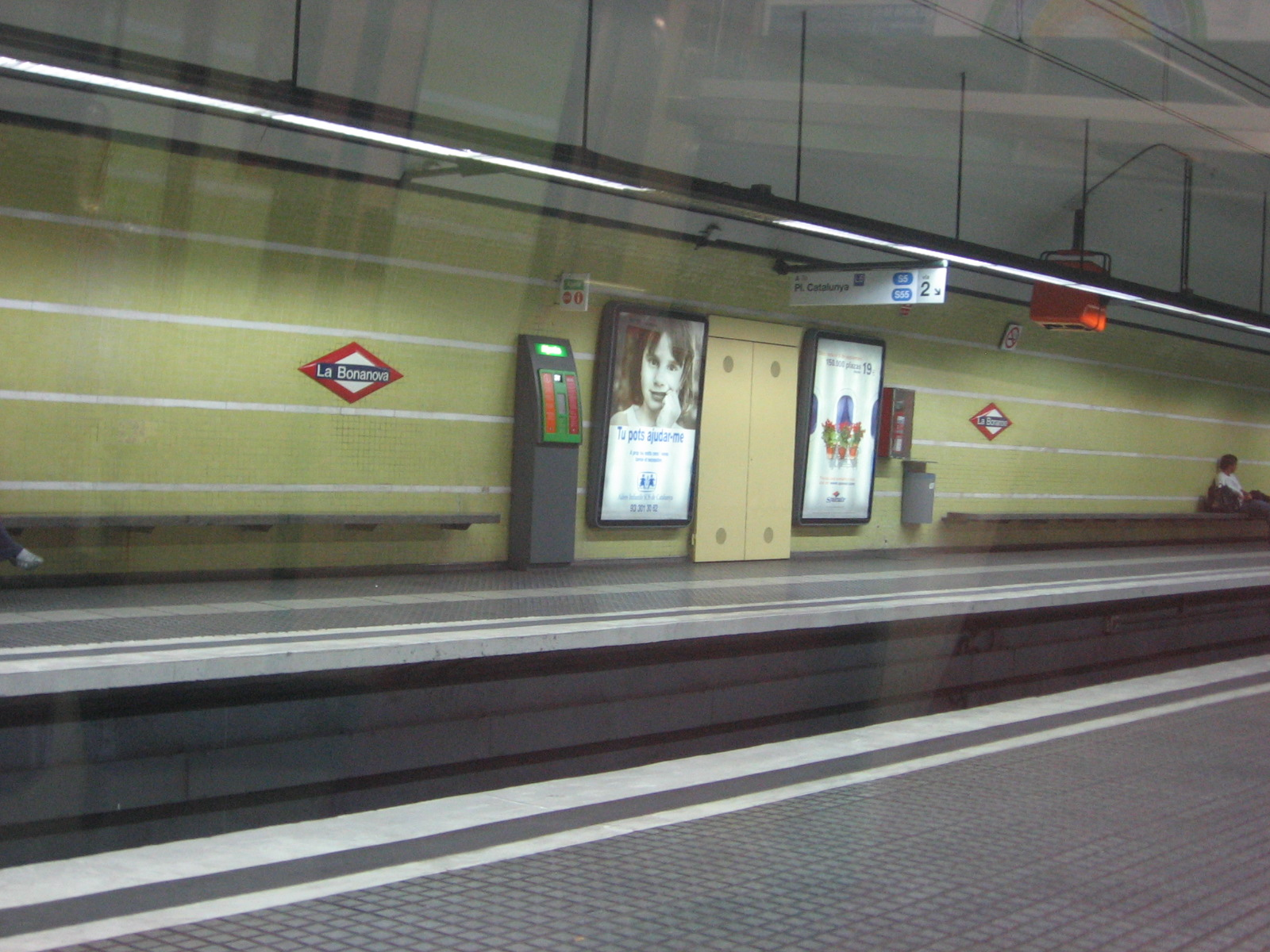 Platform of La Bonanova metro station, Barcelona/Andana de l'estació de metro La Bonanova a Barcelona